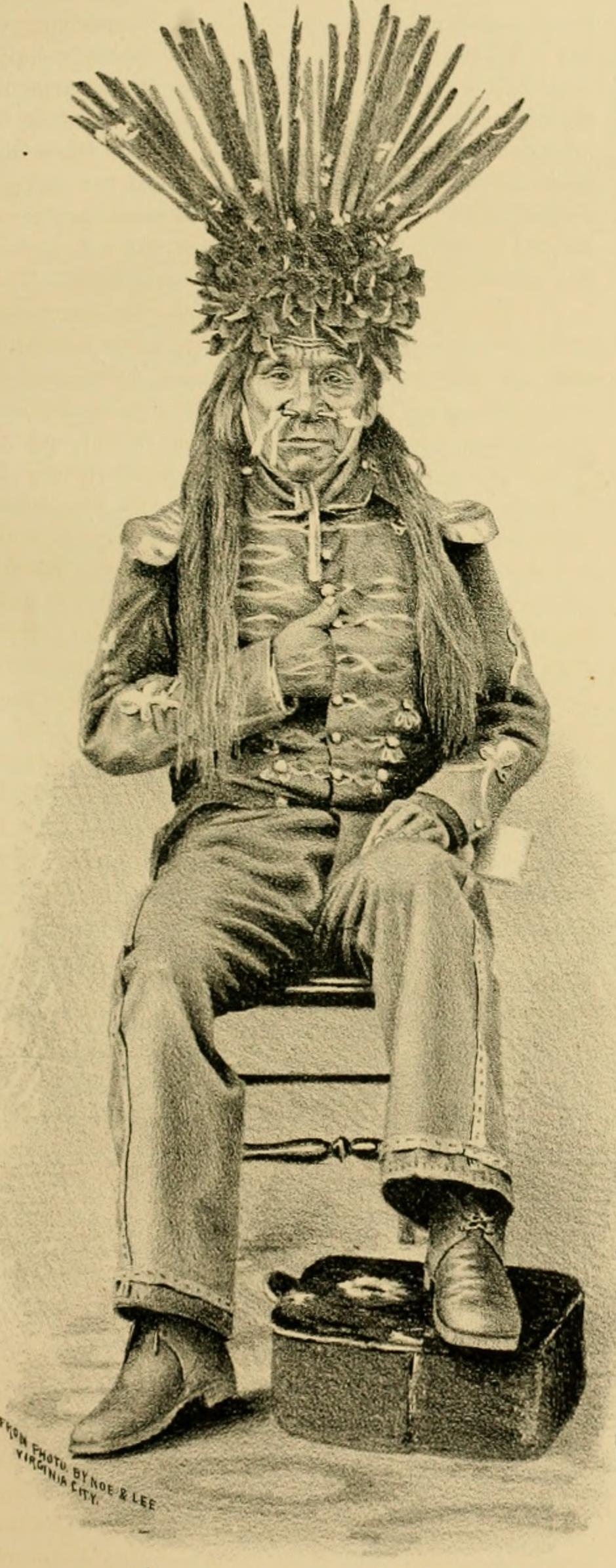 Вождь северных пайютов Truckee или Old Winnemucca.